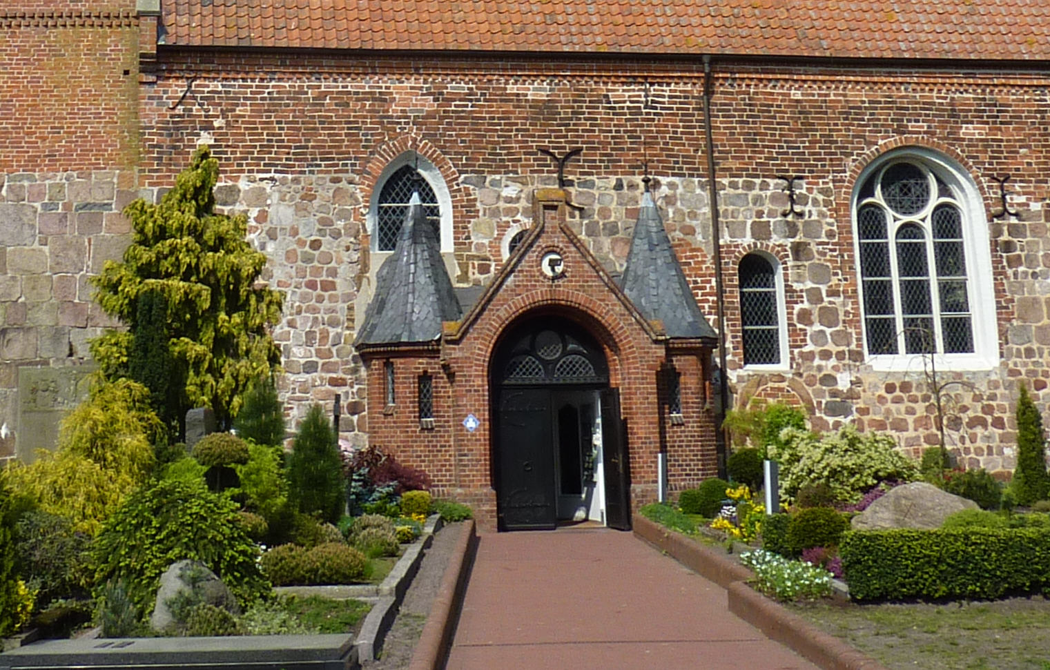 Eingang der St.-Johannes-Kirche in Bad Zwischenahn, links ein Stück des Westturms